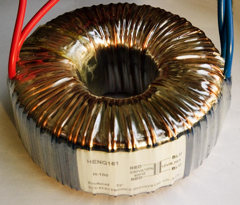 Toroidní transformátor 230/12V 100W